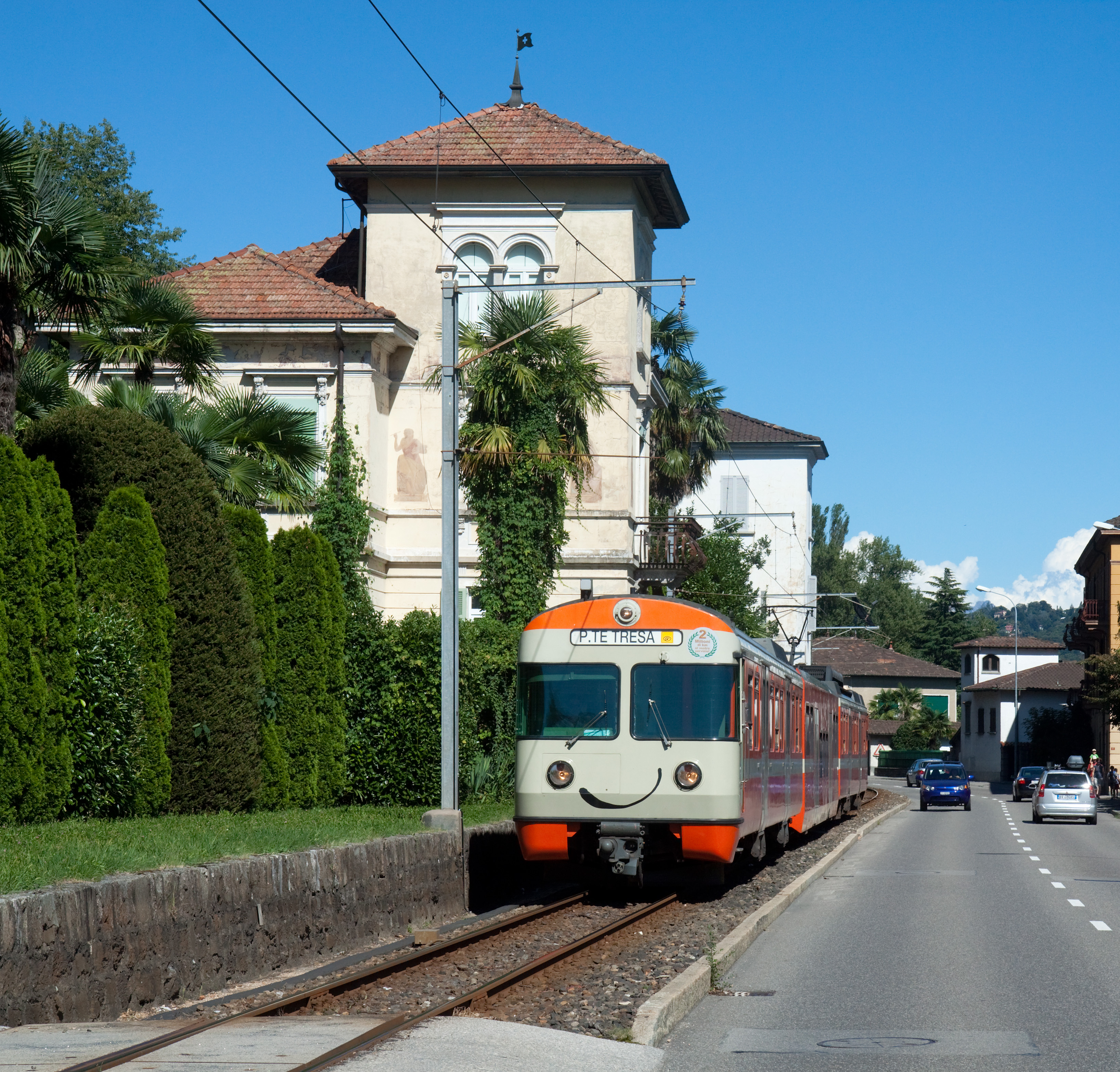 Elettrotreno Be 4/12 della FLP in arrivo a Ponte Tresa